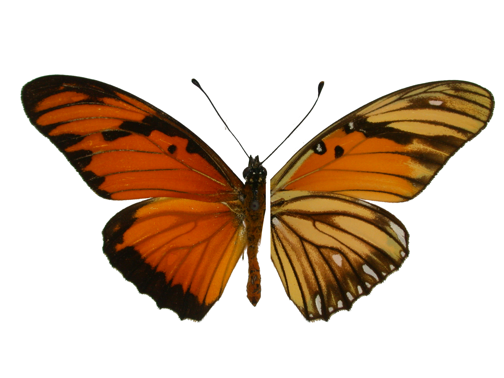 Nymphalidae Ecuador